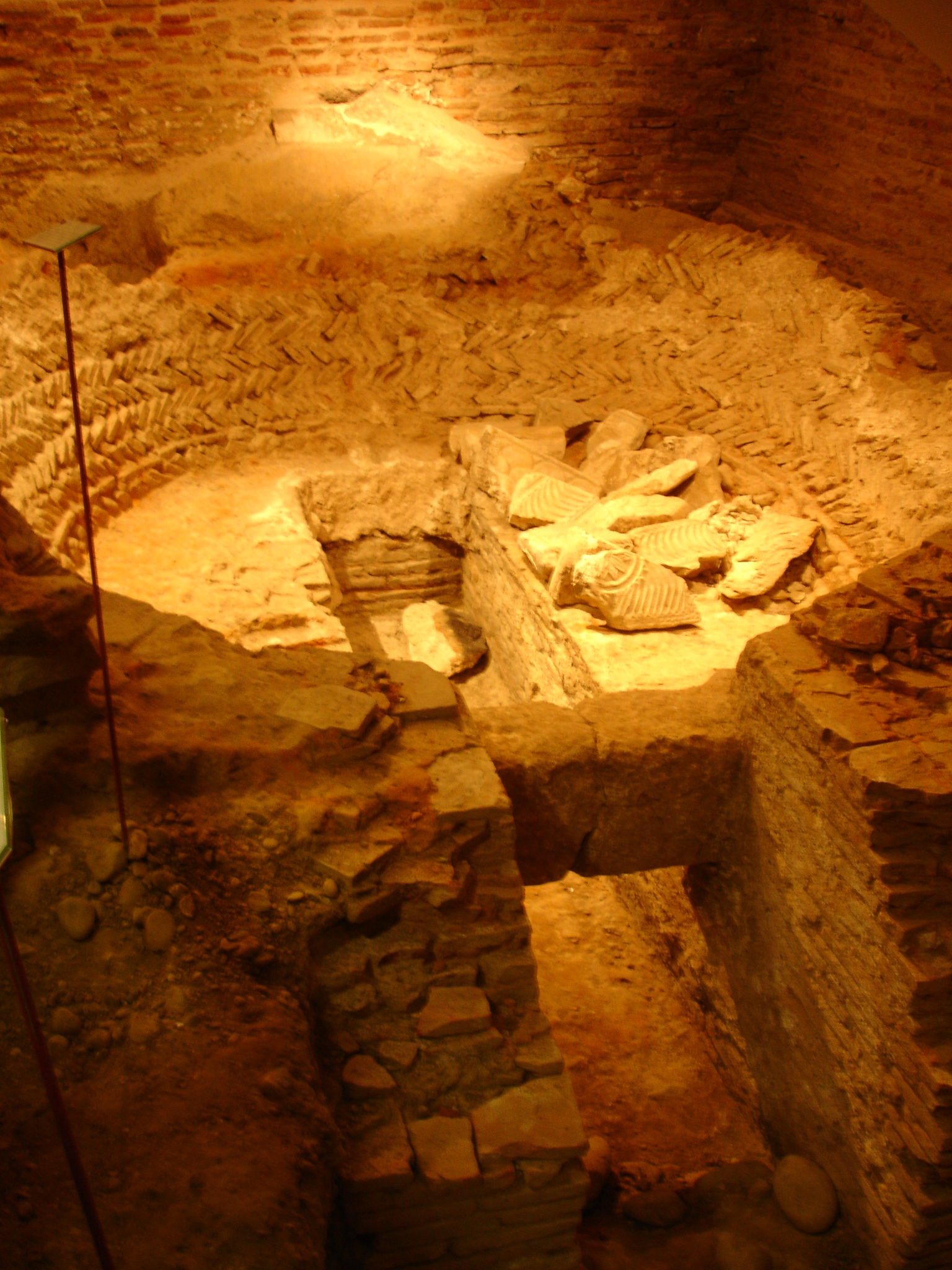 Toulouse (Haute-Garonne, France) : Musée Saint-Raymond, four à chaux découvert dans le sous-sol du musée. Il servait au recyclage des tombes en calcaire de la nécropole environnante. On voit des fragments de stèles sur la droite.